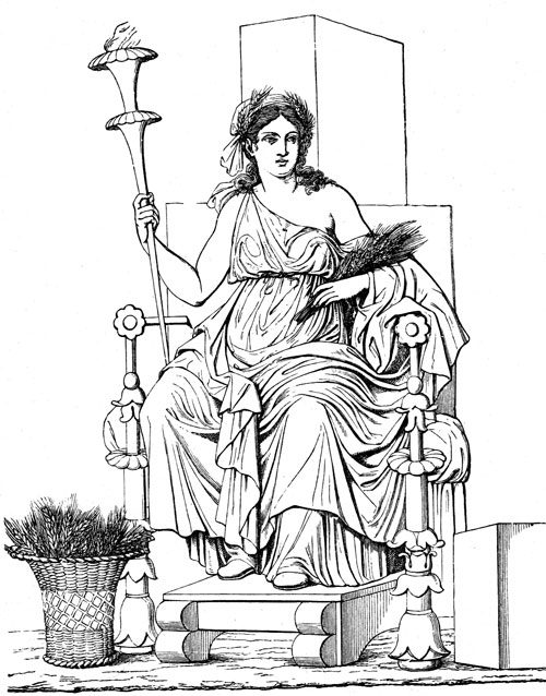 Affresco raffigurante Cerere (Demetra), rinvenuto a Pompei nella Casa del Naviglio, oggi al Museo Archeologico Nazionale di Napoli (inv. 9457).